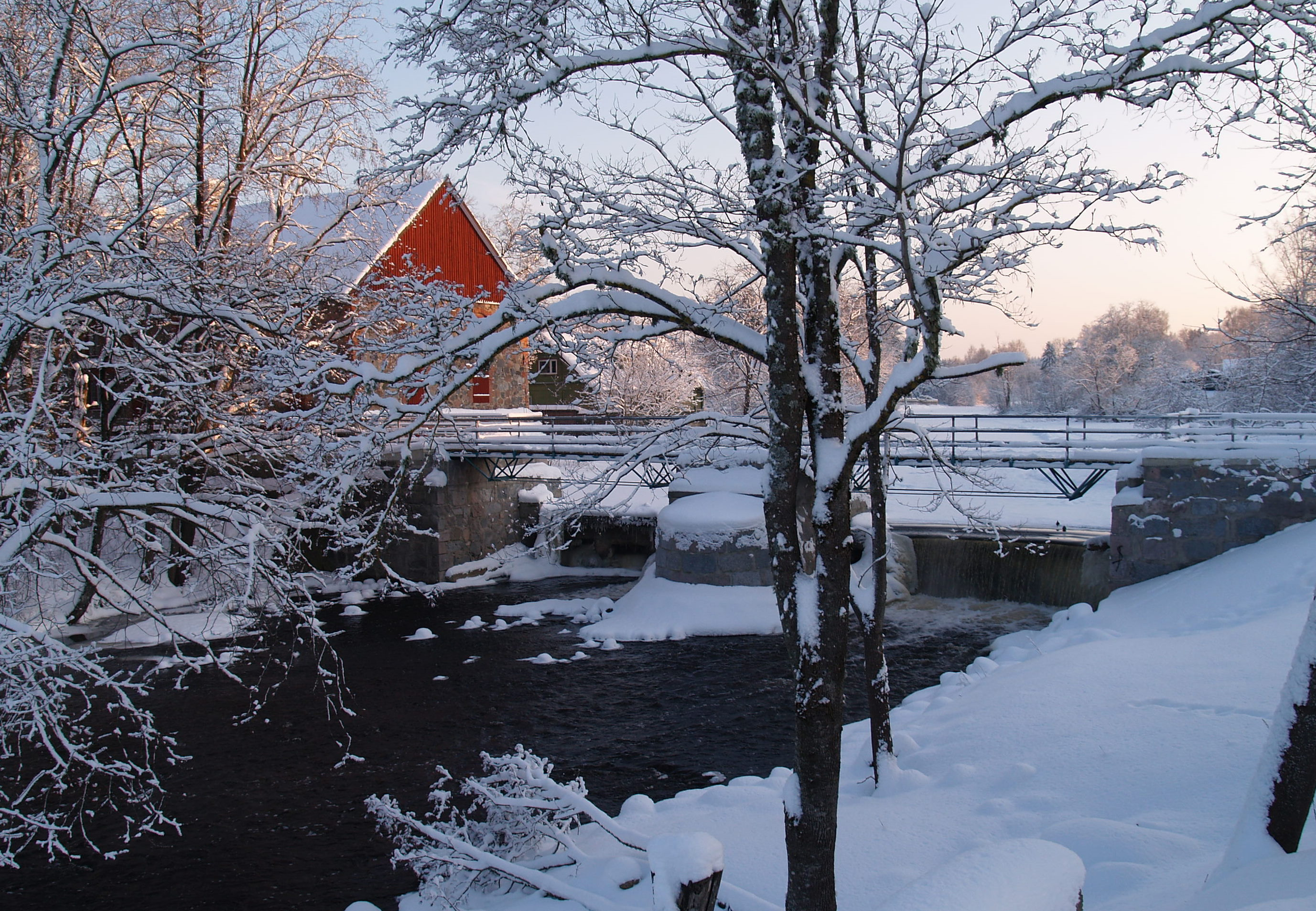 Jalakäijate sild üle Pirita jõe Kose alevikus Harju maakonnas.